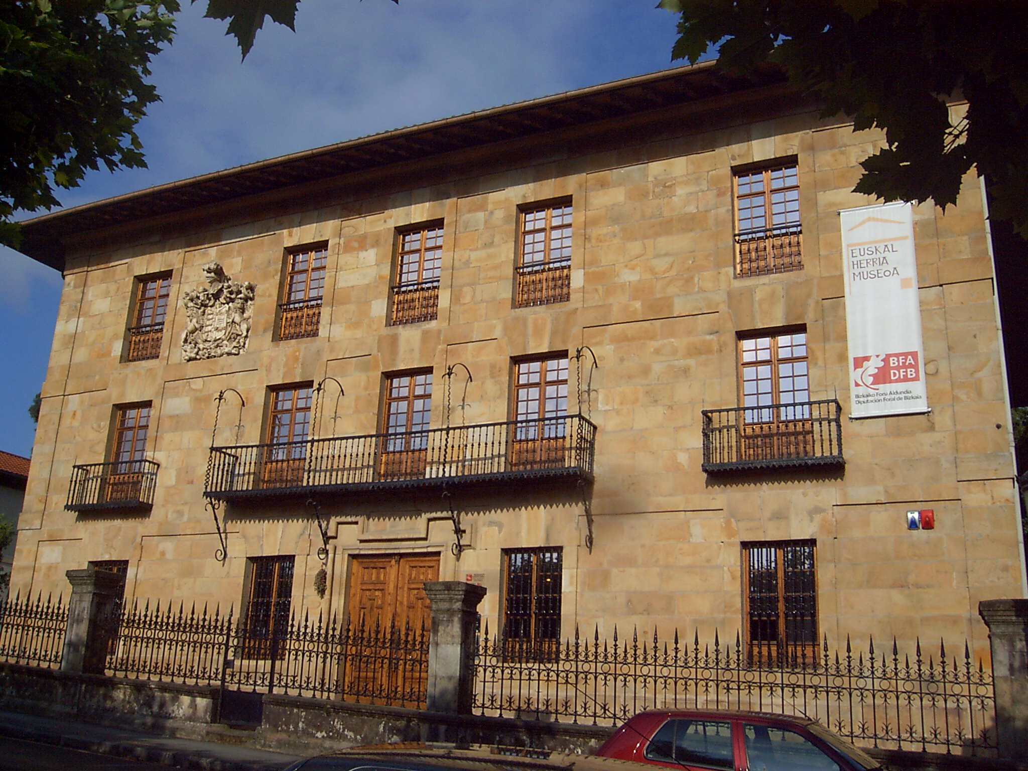 Gernika. Euskal herria museoa